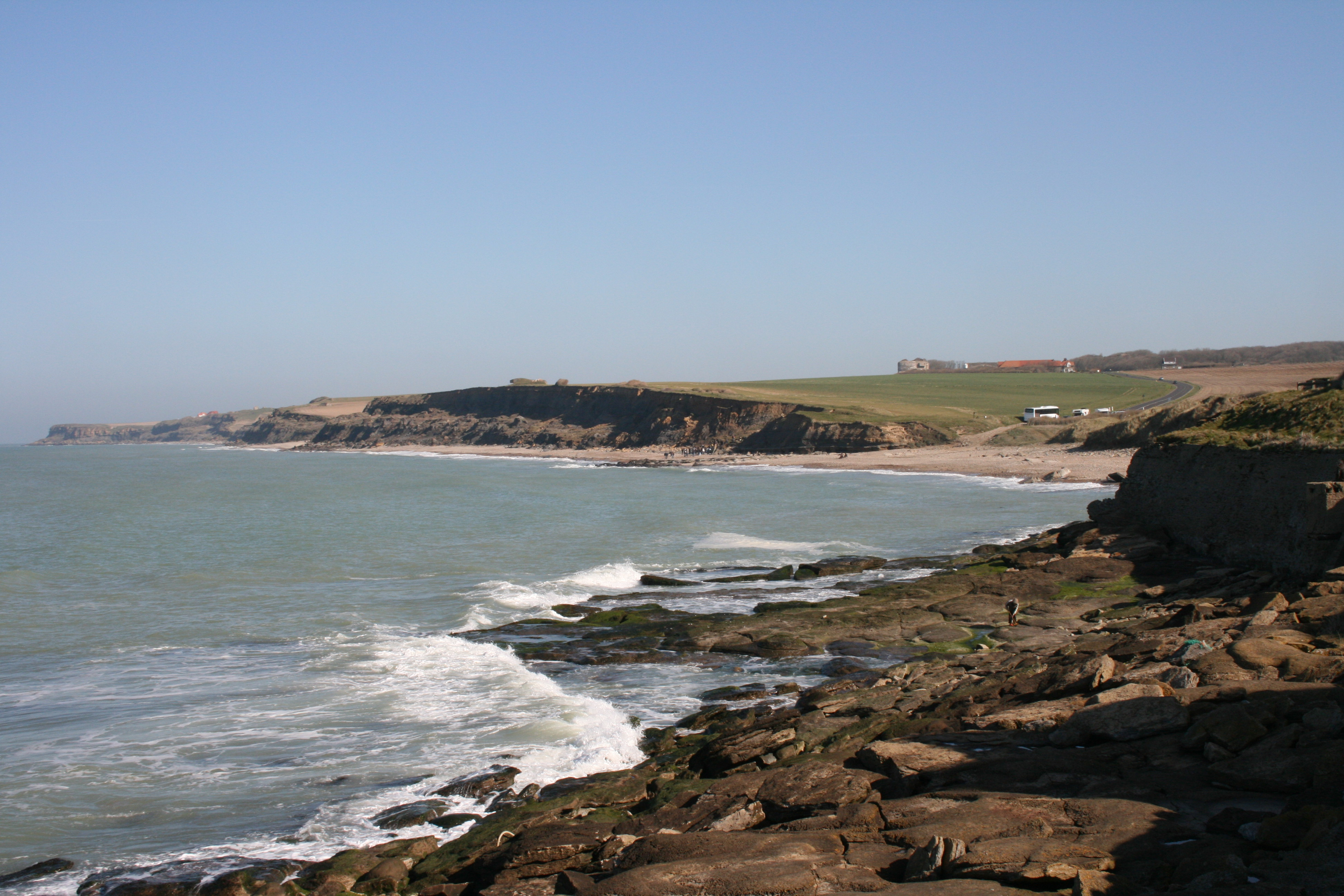 Vue d'Audresselles vers la Pointe du Nid de Corbet et Audighen, bunkers du Mur de l'Atlantique à l'horizon, département du Pas-de-Calais, France